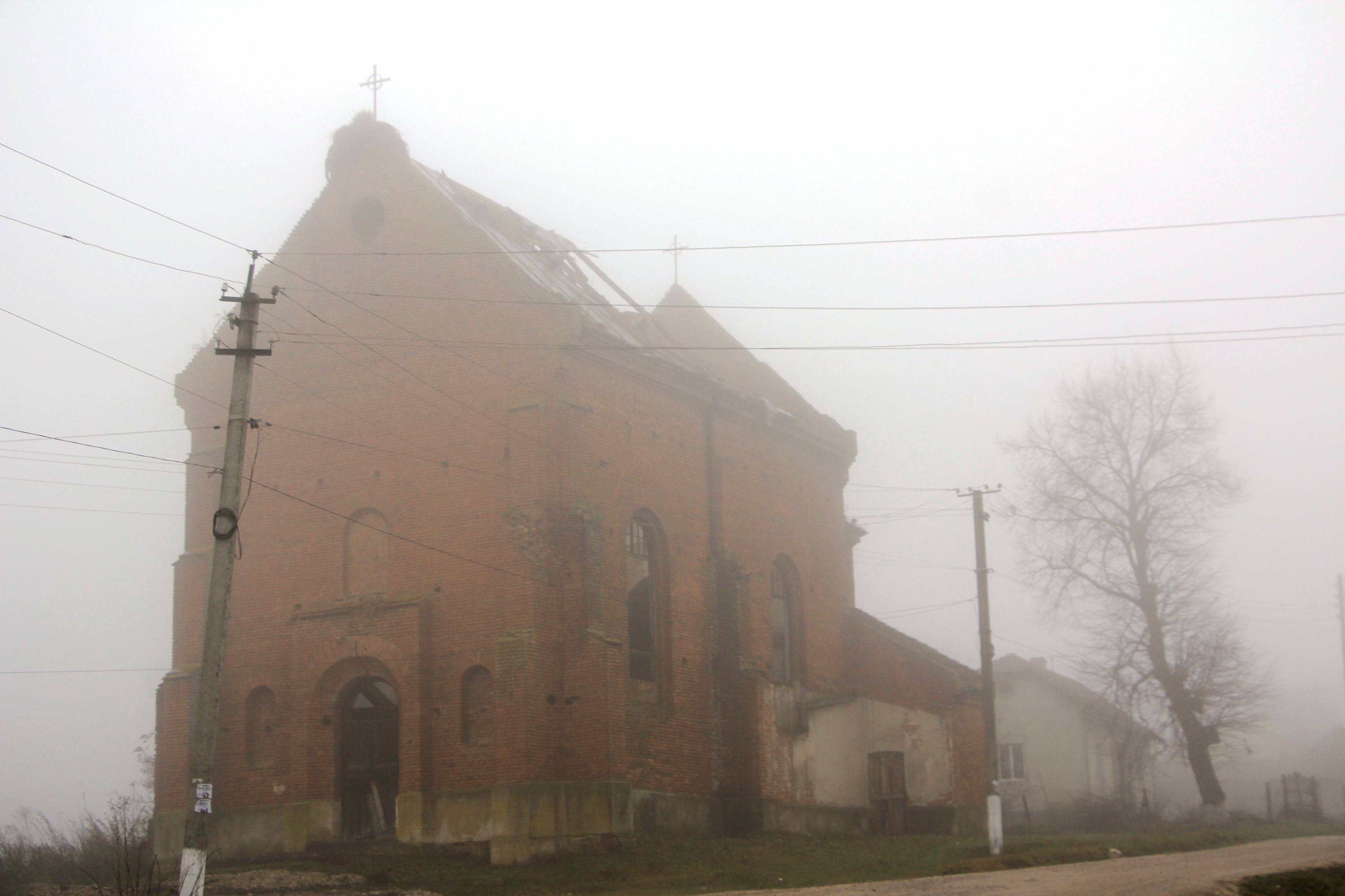 Руїни костелу